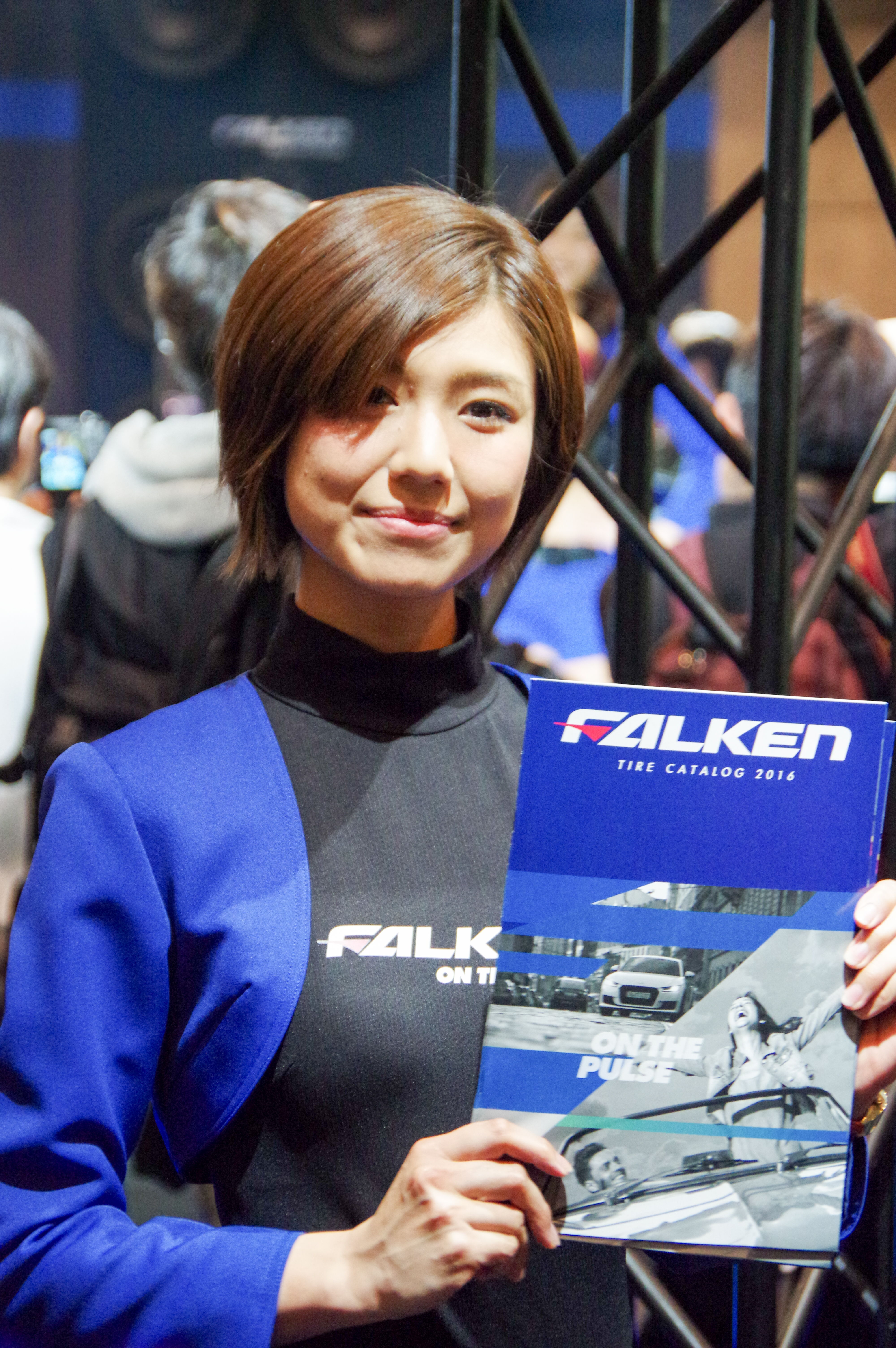 TOKYO AUTO SALON 2016 _50